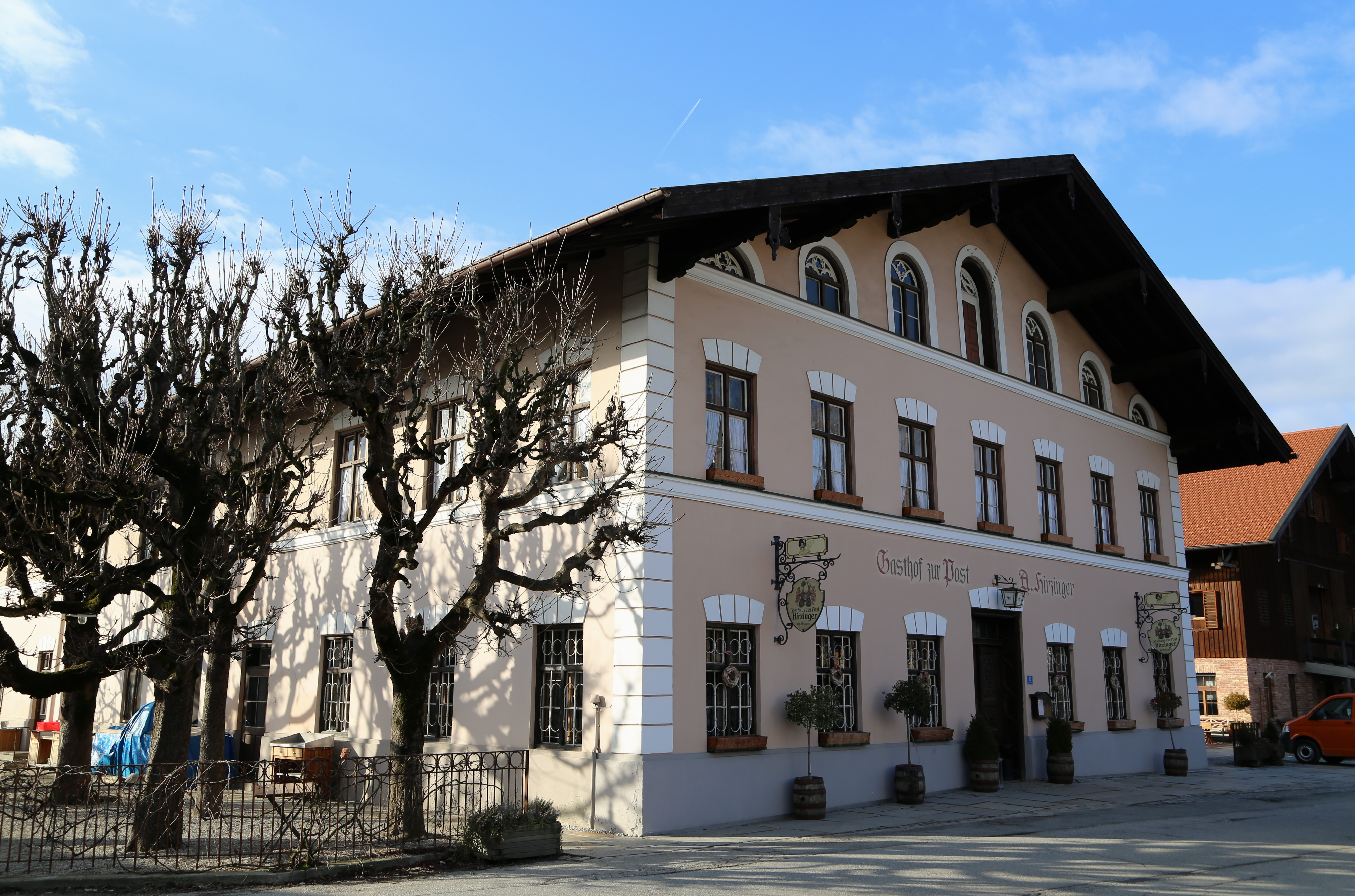 Endorfer Straße 13; Gasthaus, dreiflügelige Anlage mit Wohnbau und Nebengebäuden, zweigeschossiger Flachsatteldachbau mit Rundbogenfenstern im Giebel, spätklassizistische Putzgliederung und neugotische geschnitzte Tür, um 1870-80; mit Ausstattung.